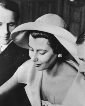 Huwelijk van Prins Sadrukdin Khan met Nina Dyer in Collonges Geneve, Zwitserland augustus 1957; v.r.n.l. Nina Dyer (...)